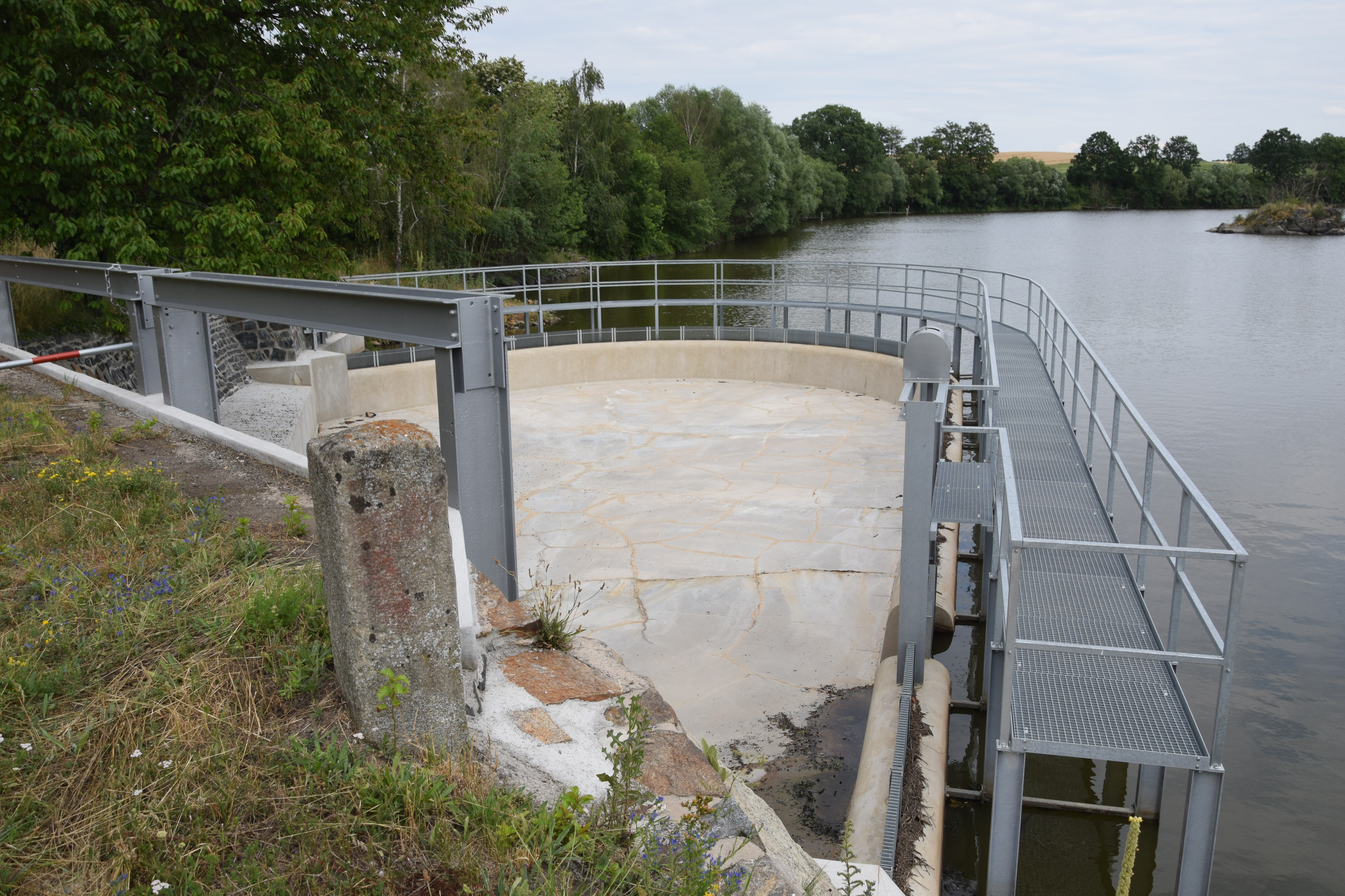 Nový přeliv z roku 2018